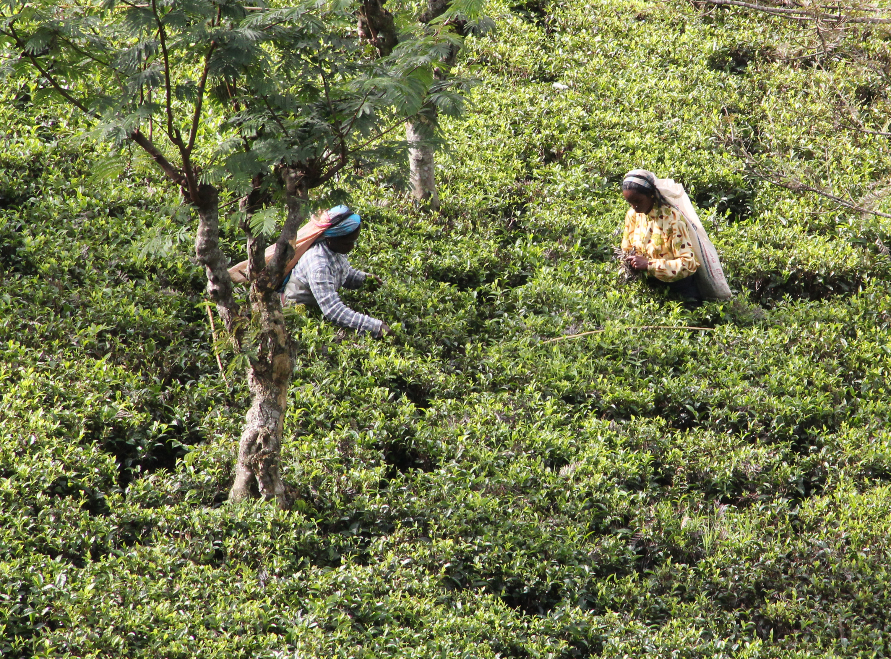 Tea Picking, Nuwara Eliya